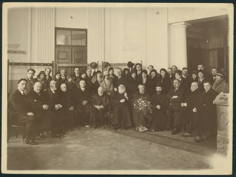 Снимка от 80-годишния юбилей на д-р Анастасия Ангелова Головина (17 окт. 1850 – 5 март 1933), Варна, 1930 г. На снимката са: седнали от ляво на дясно: д-р Ганев, д-р Шишков, неизв., неизв., д-р Божков, д-р Пискюлиев, Варненски и Преславски митрополит Симеон (1840 - 23 окт. 1937), д-р Анастасия Головина, епископ Андрей, д-р Недялков, д-р Попов и д-р Скорчев; сред гостите на втория ред прави са: д-р Хаджолян, В. Пашев, зъболеакарите Папазян, Моллов и Кр. Пашев, акушерките Аврамова и Спасова, Юрий Головин (син на д-р Анастасия Головина), д-р Мишин и Люба Свракова.